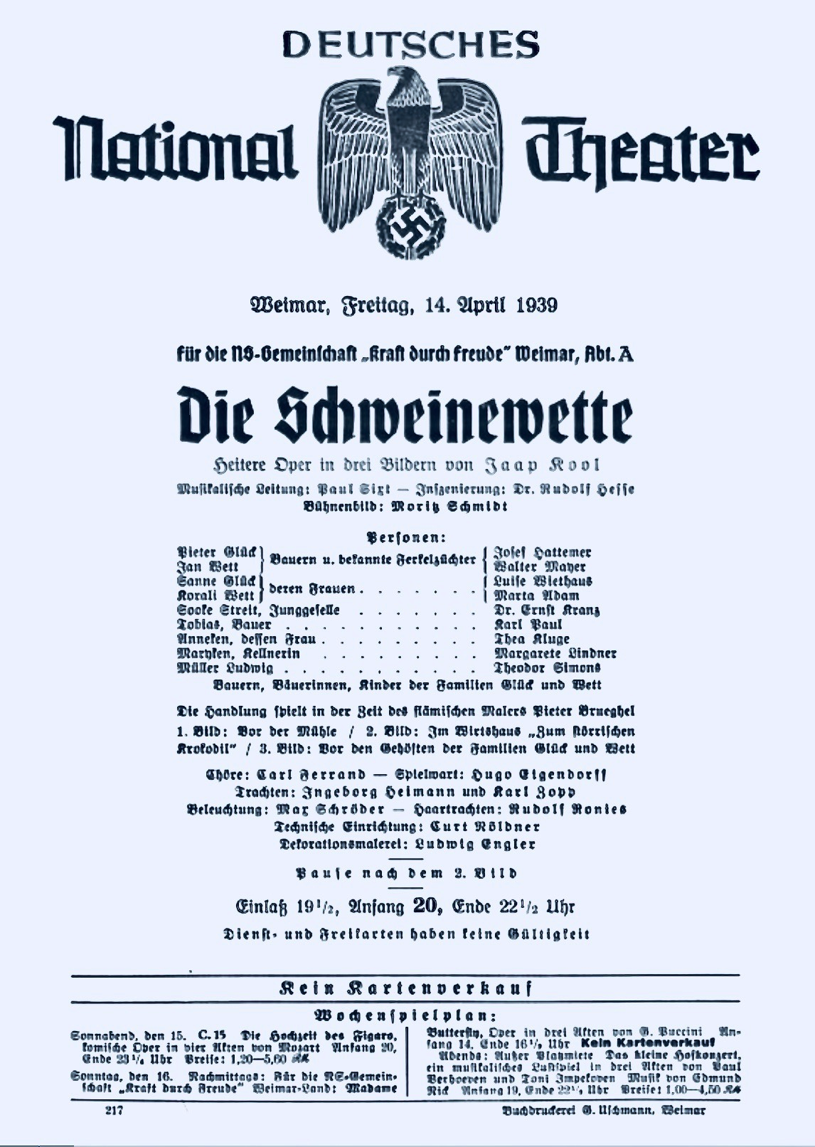 Deutsches Nationaltheater Weimar: Die Schweinewette, heitere Oper in drei Bildern von Jaap Kool, für die NS-Gemeinschaft Kraft durch Freude Weimar, Premiere: Freitag, 14. April 1939, musikalische Leitung: Paul Sixt, Inszenierung: Dr. Rudolf Hesse